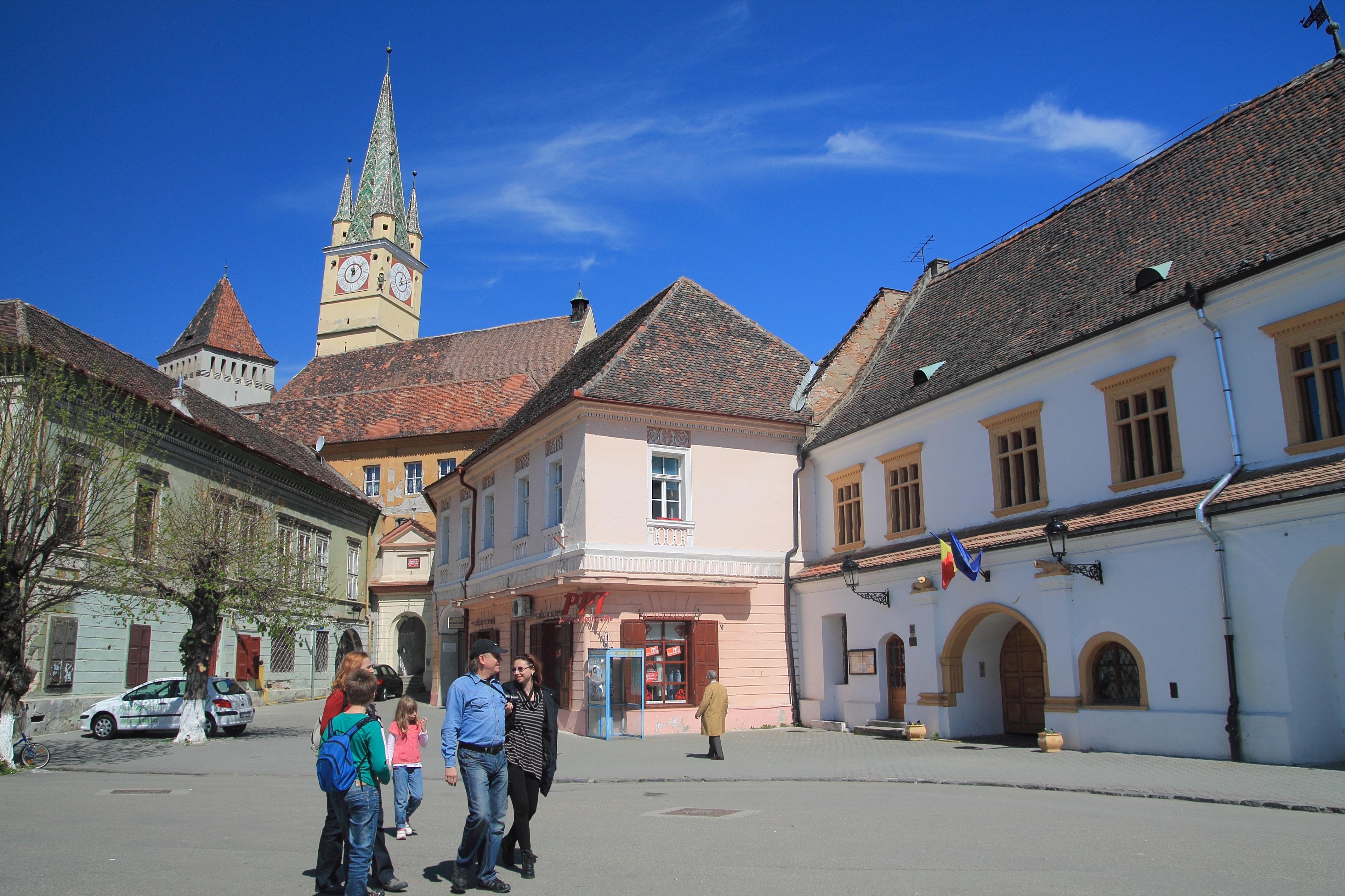 Ansamblul urban "Centrul istoric al municipiului"